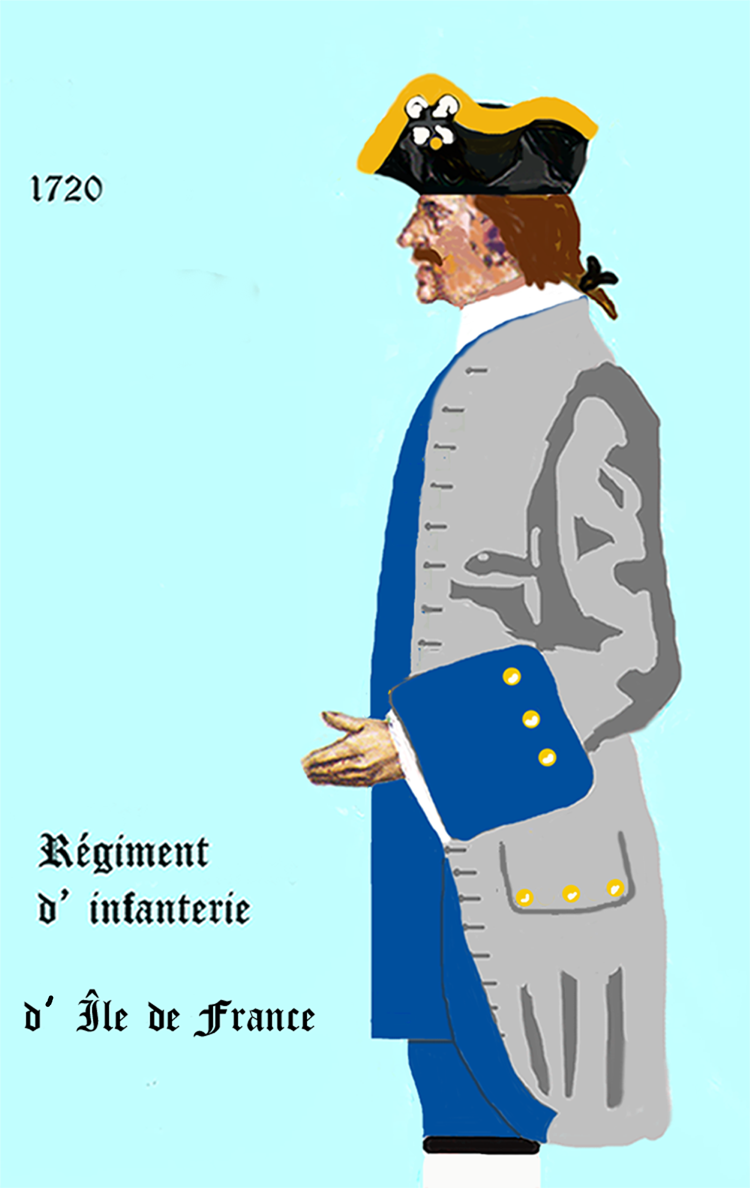 Uniform eines königlich französischen Infanterie-Regiments von 1720. - Entnommen und überarbeitet aus: „LES UNIFORMES ET LES DRAPEAUX DE L'ARMÉE DU ROI“ Marseille 1899.